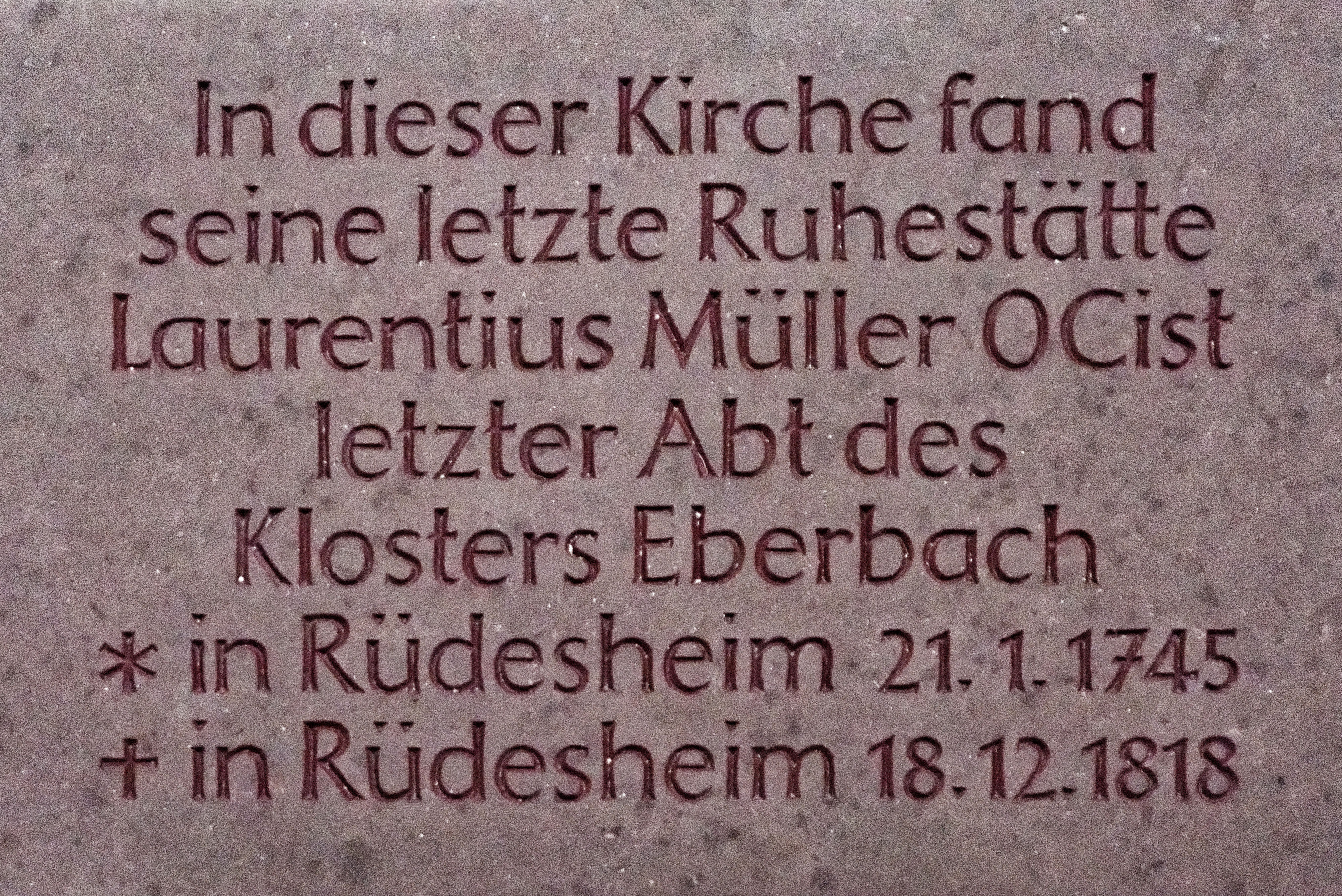 St. Jakobus Rüdesheim Innenansicht Detail